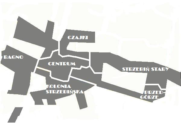 Mapa podziału administracyjnego Strzebinia